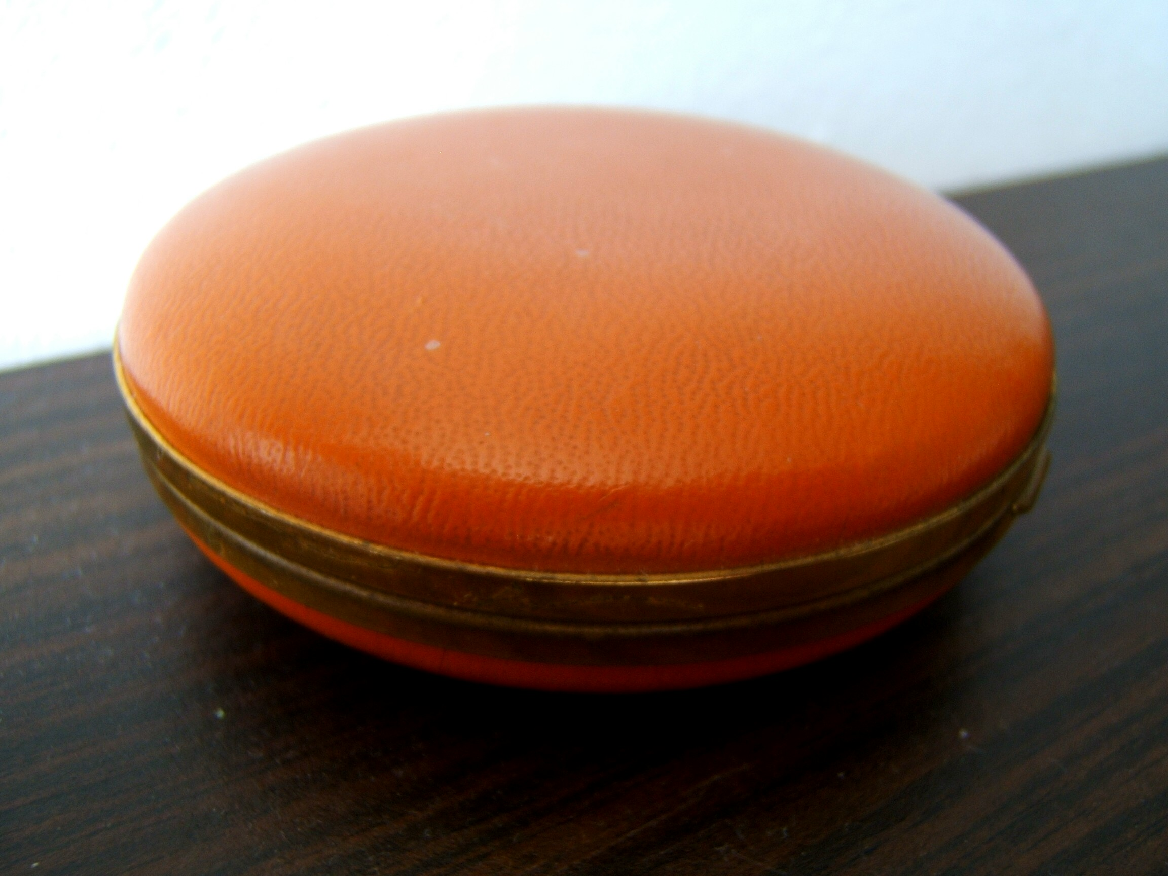 reiswekker